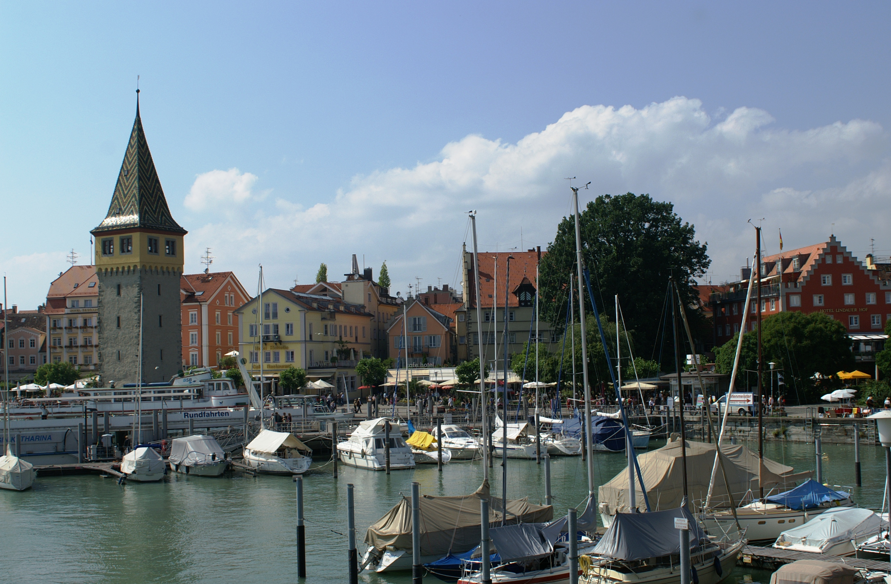 Lindau (Bodensee)